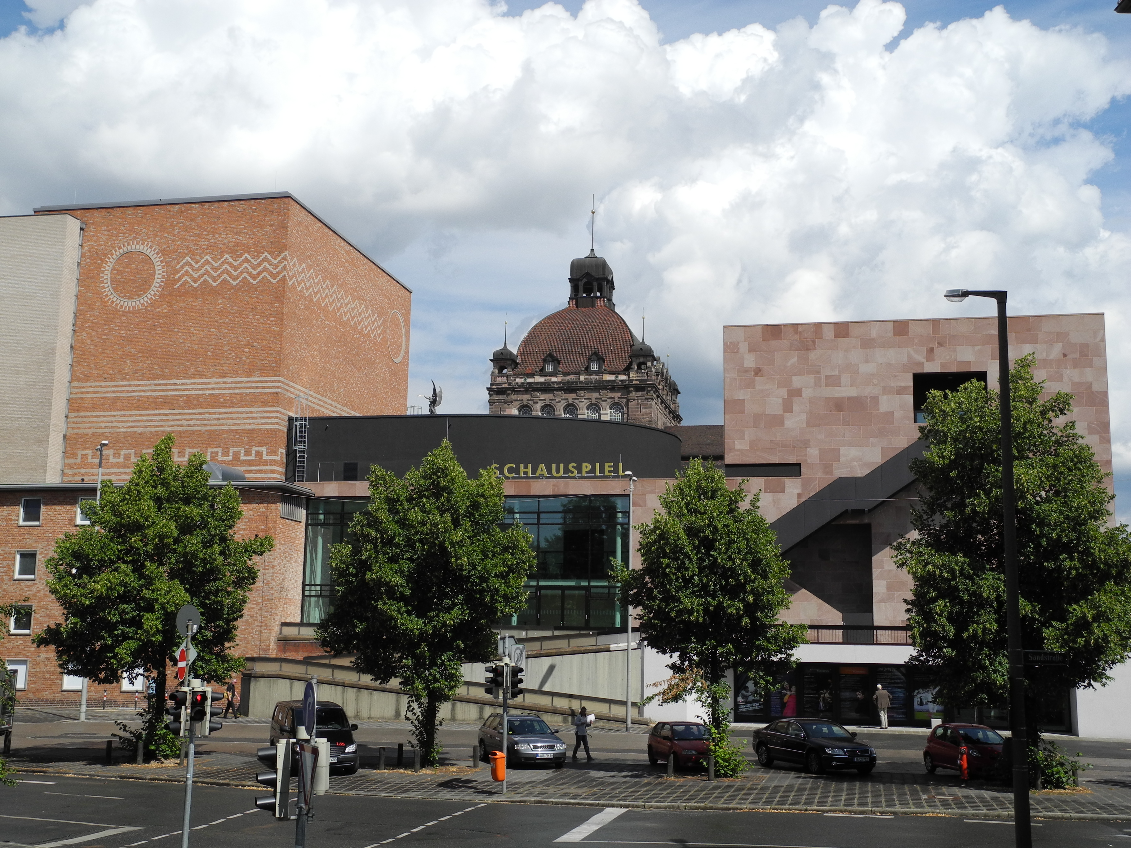 Schauspiel- und Opernhaus am Staatstheater Nürnberg, Ansicht von Süden